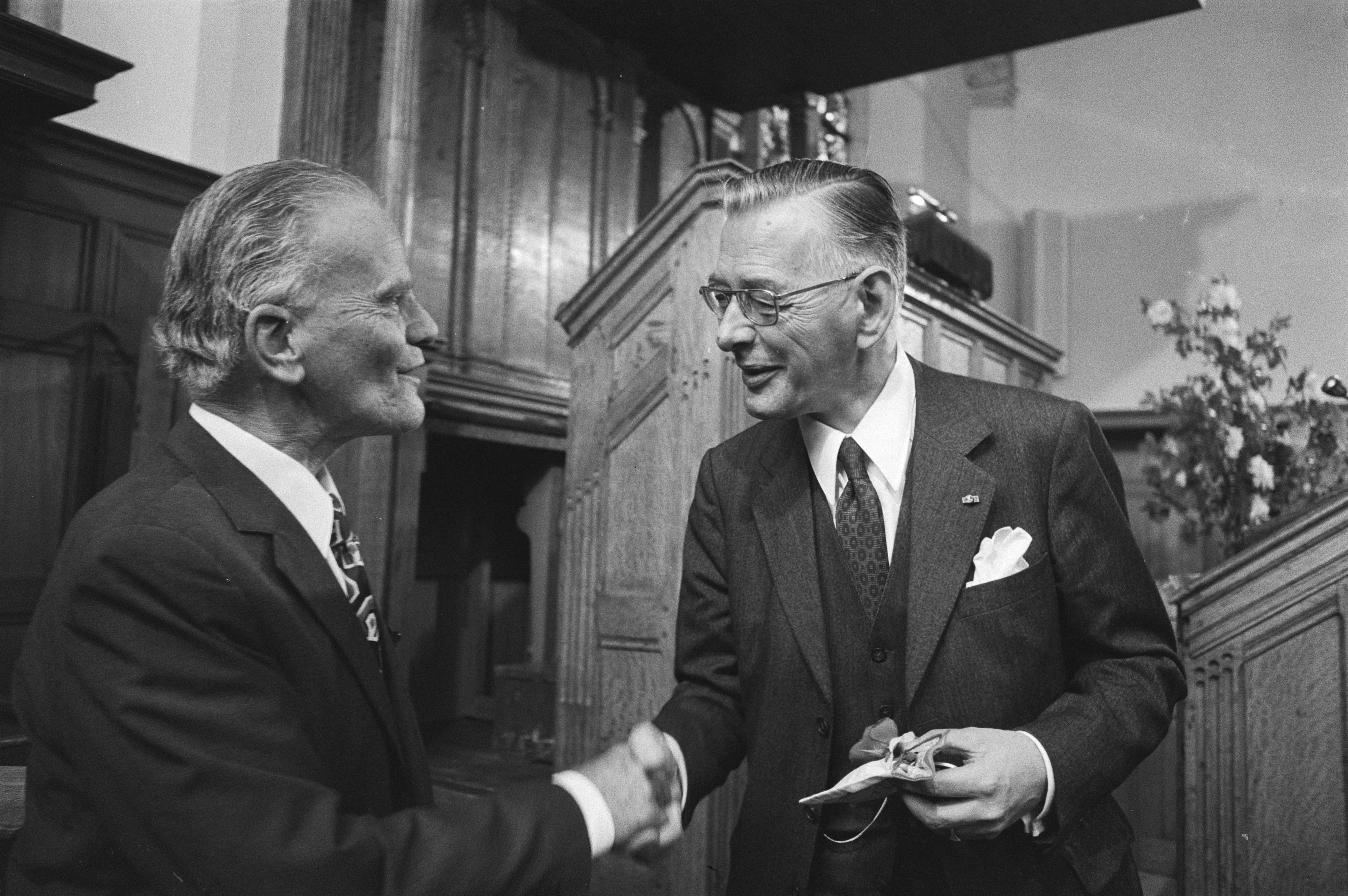 Collectie / Archief : Fotocollectie Anefo Reportage / Serie : [ onbekend ] Beschrijving : Prof. mr. A. M. Donner (r) ontvangt Thorbeckeprijs uit handen van voorzitter Boetselaar Datum : 2 juni 1978 Trefwoorden : ontvangsten, prijsuitreikingen, voorzitters Fotograaf : Verhoeff, Bert / Anefo Auteursrechthebbende : Nationaal Archief Materiaalsoort : Negatief (zwart/wit) Nummer archiefinventaris : bekijk toegang 2.24.01.05 Bestanddeelnummer : 929-7541